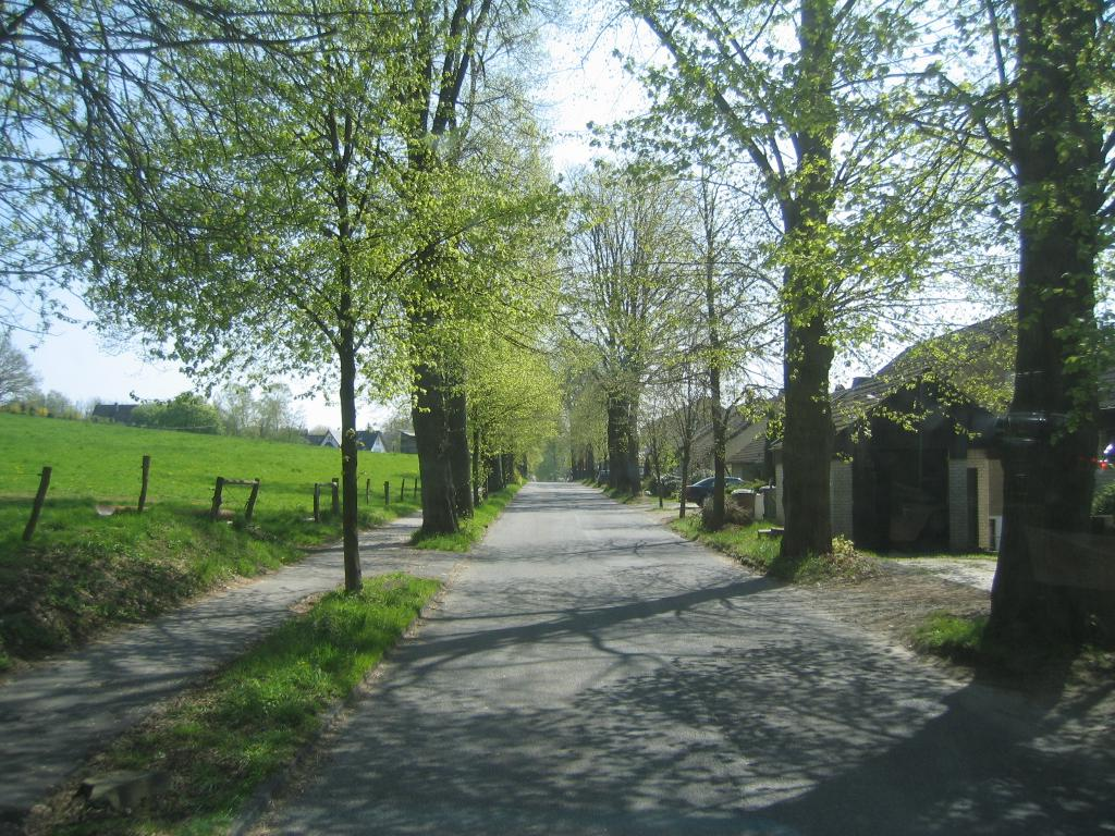 Lindlar-Altenlinde, Allee April 2005